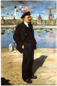 И. И. Бродский. Ленин на фоне Кремля. 1924. Холст, масло. Центральный музей В. И. Ленина. Москва.